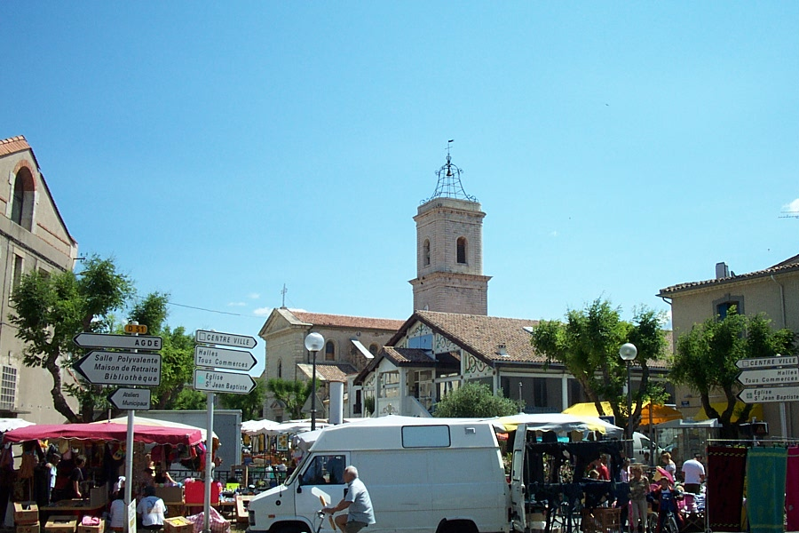 Zelfgemaakte foto in juni 2005. Vrijgegeven onder GFDL.